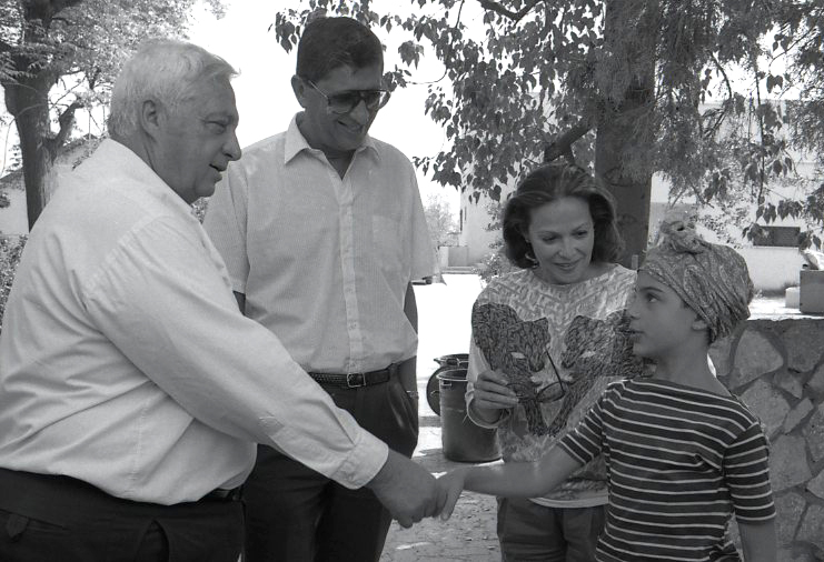 אריק שרון מבקר באתר הסרט "הקיץ של אביה" כשלצידו גילה אלמגור וקאיפו כהן